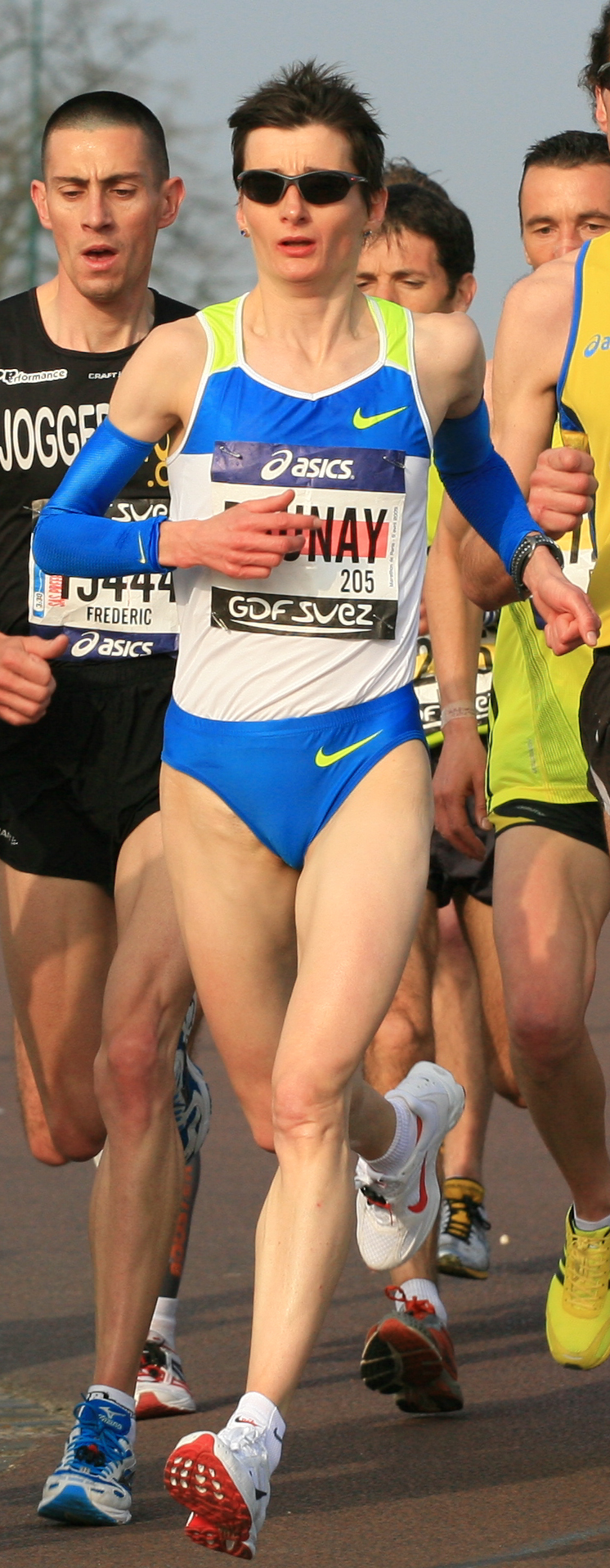 Christelle Daunay au marathon de Paris 2009 (passage à Vincennes)